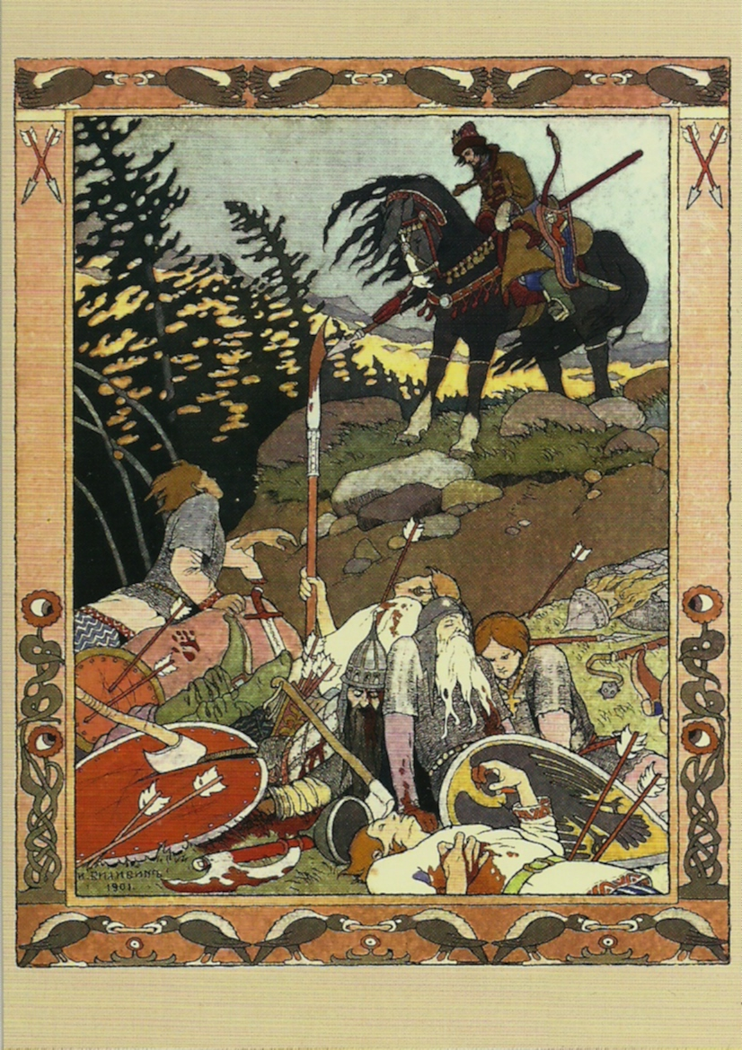 Иллюстрация к сказке «Марья Моревна»/ Иван Тугарин на побоище